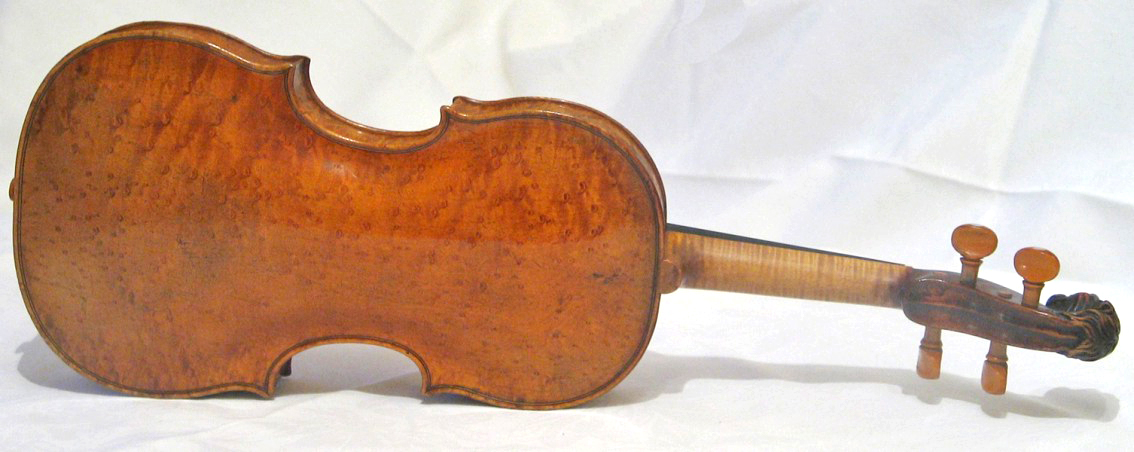 Jacob Stainer-Gei Récksäit